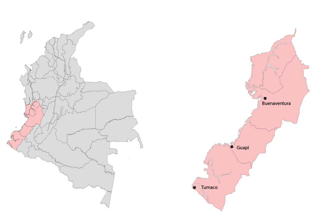 Eje musical del Pacífico Sur